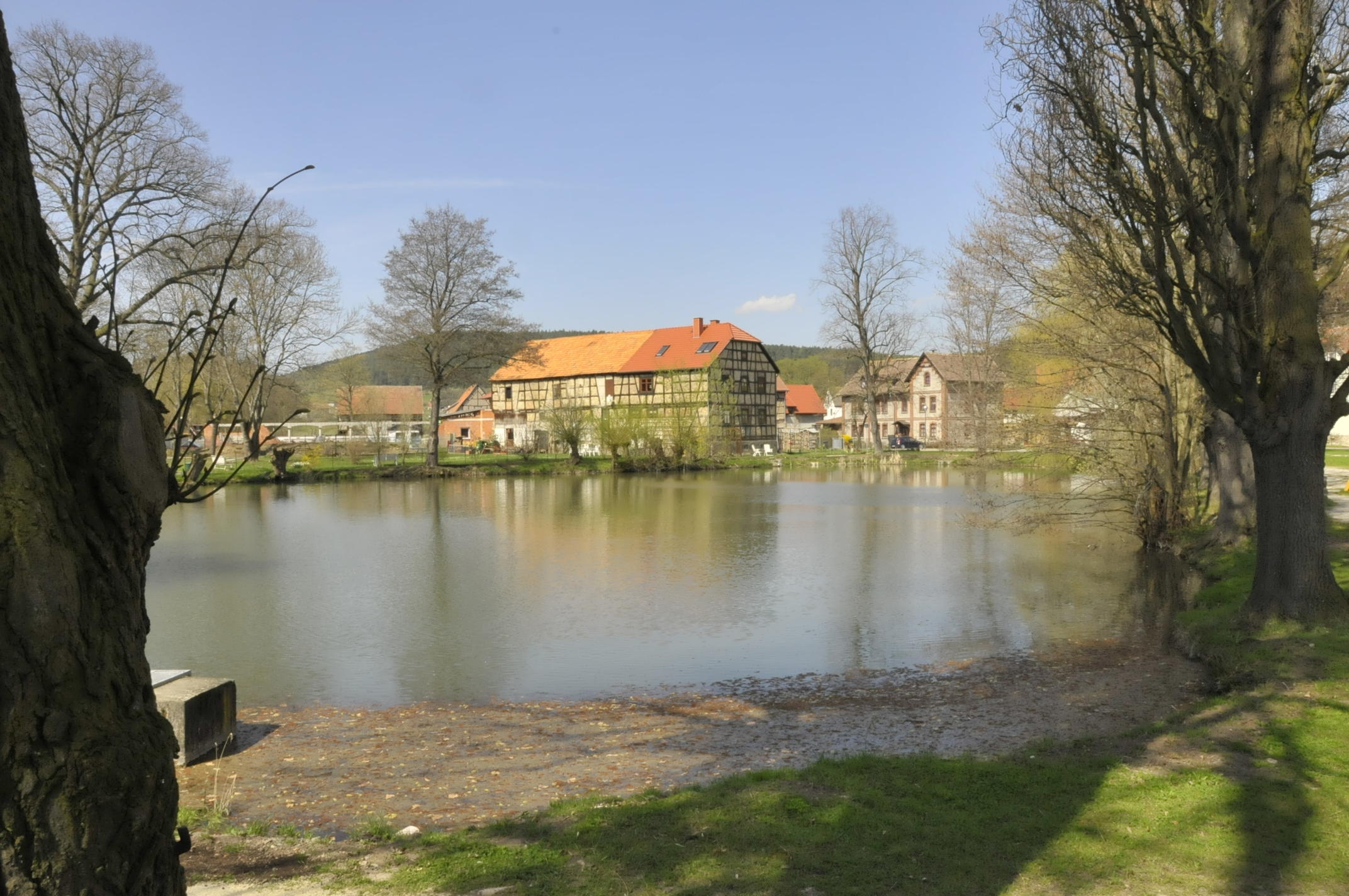 Behringen, Schlossteich